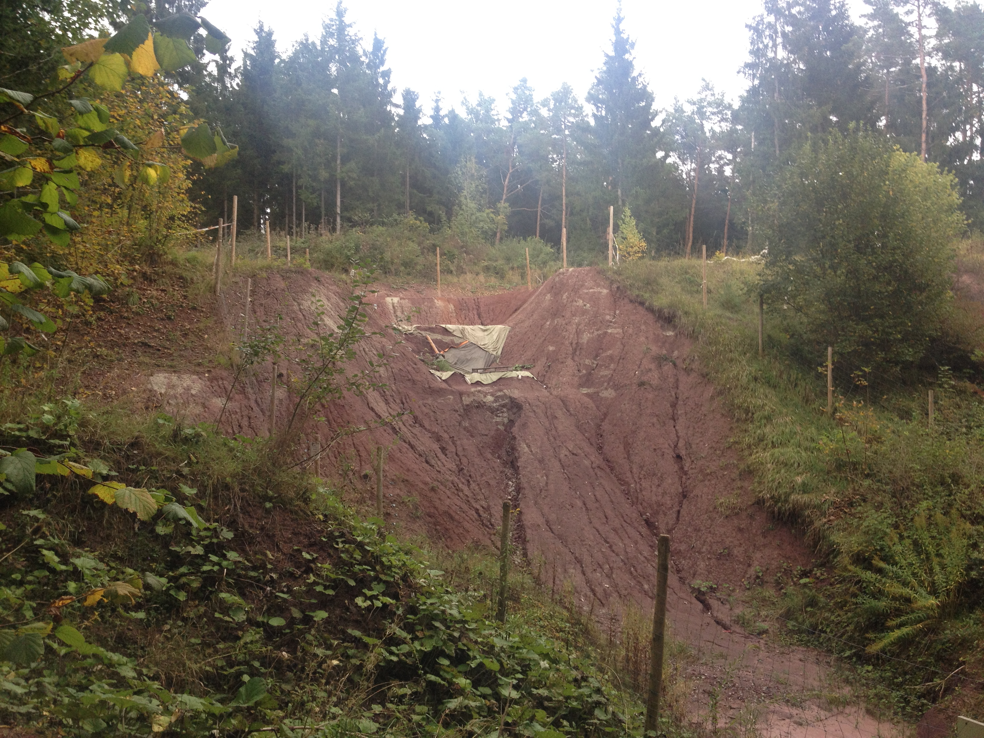 Die weltweit größte Saurierfundstelle aus der Trias, die "Rutschete" bei Trossingen